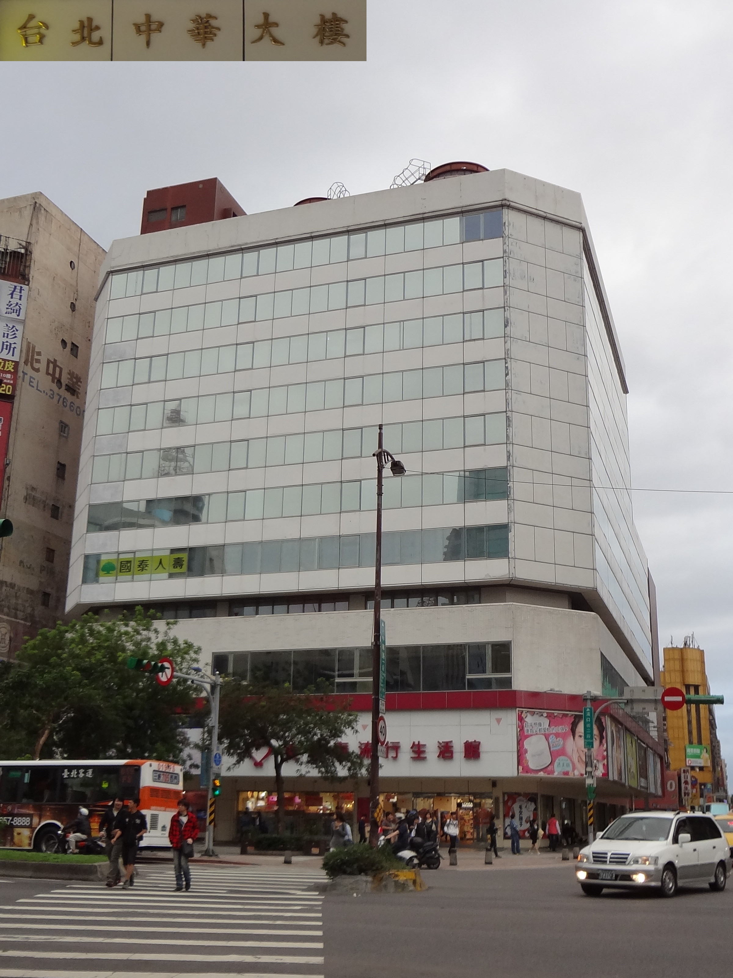 國泰一號台北中華大樓，位於臺北市萬華區中華路一段88號。